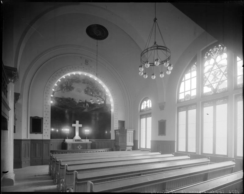 Interiör mot koret i Sankt Peterskyrkan, Upplandsgatan 12 Foto Nyckelord Plats: Kvarteret VINGRÅEN. Kammakargatan. Upplandsgatan 12. Norrmalm. Tid: 1902 Ämne: Interiörer. Kyrkor. Takkronor. Kyrkbänkar. Referenser Upphov: Okänd. Tid: 1902 Beteckning: Fotonummer C 1785